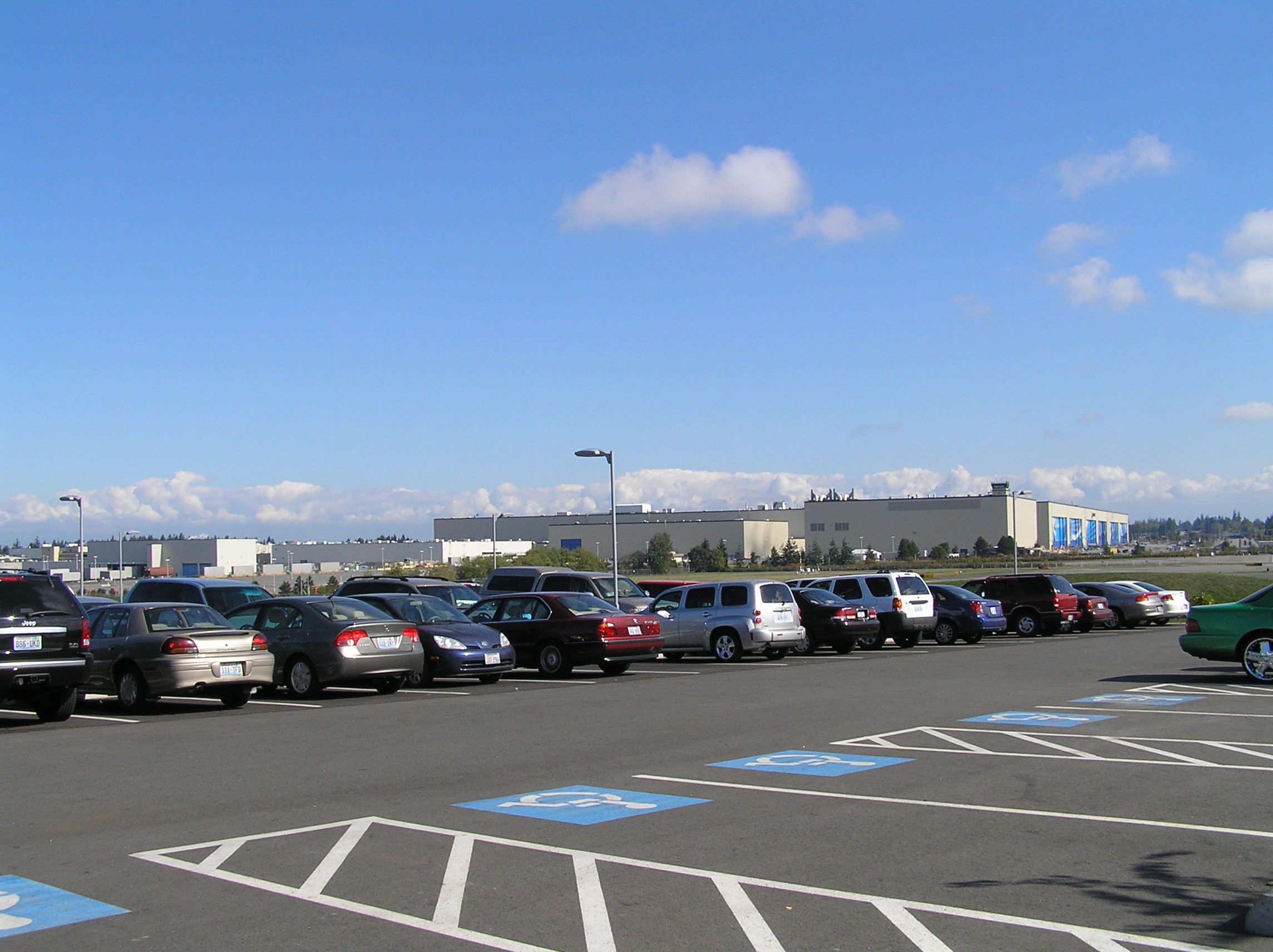 Boeingi tehas Everettis, maailma suurima kubatuuriga hoone. Boeingu tootmishoone Washingtoni osariigis Everettis on maailma suurima kubatuuriga hoone.